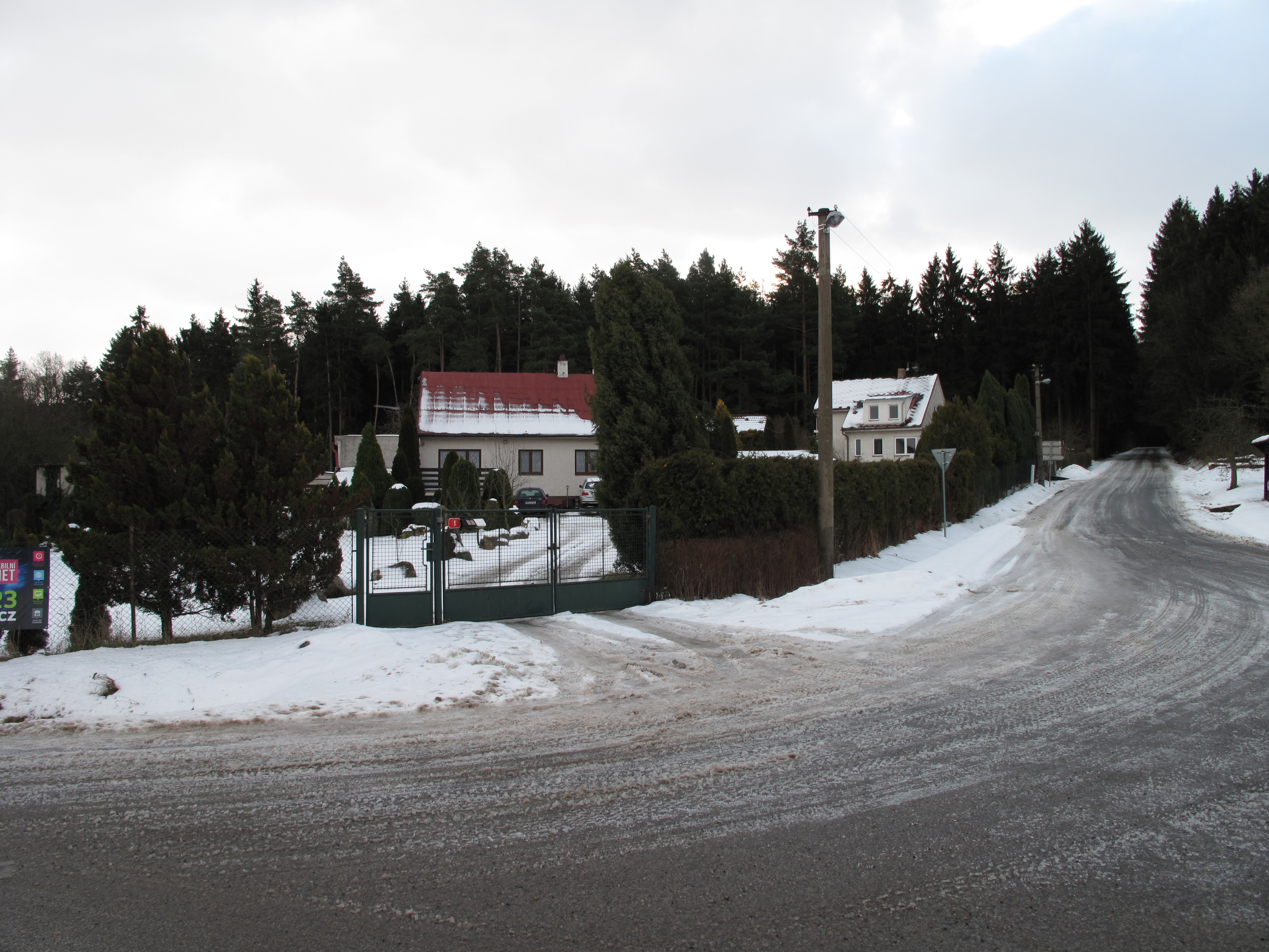 Domy v Hliňánkách. Okres Benešov, Česká republika.